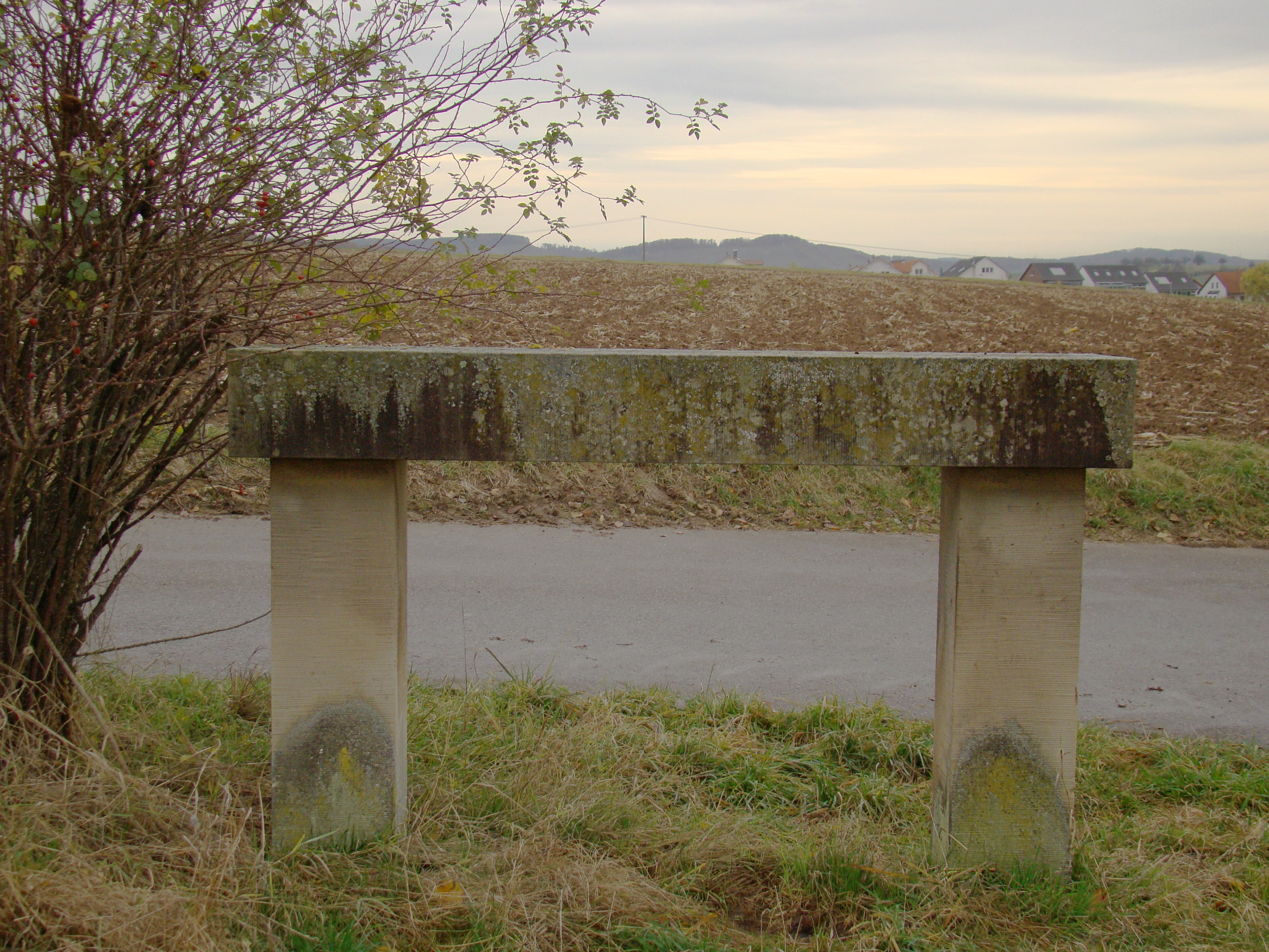 Gruhe bei Höpfigheim